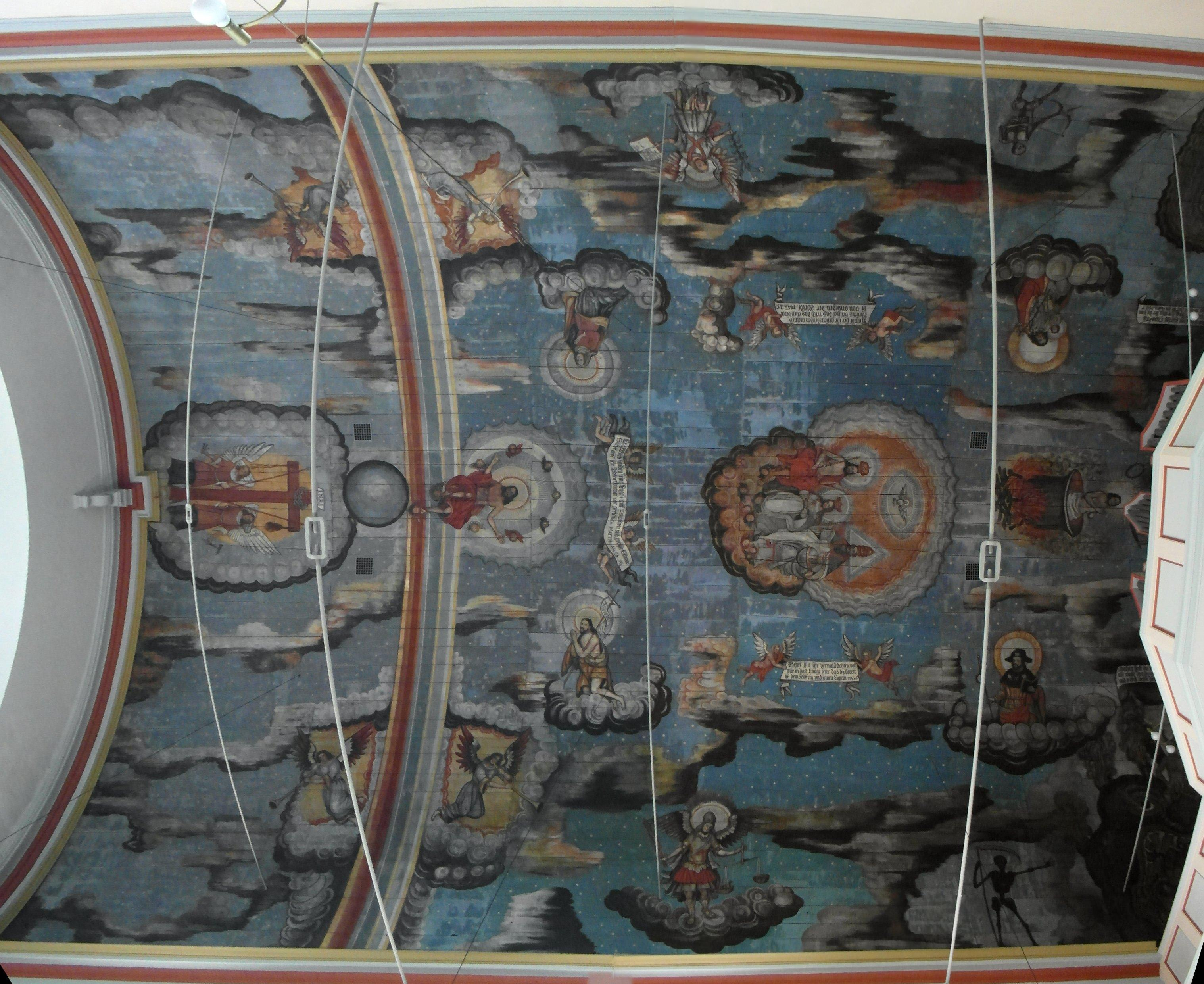 Kirchenhimmel der St.Vitus Kirche Breitenworbis